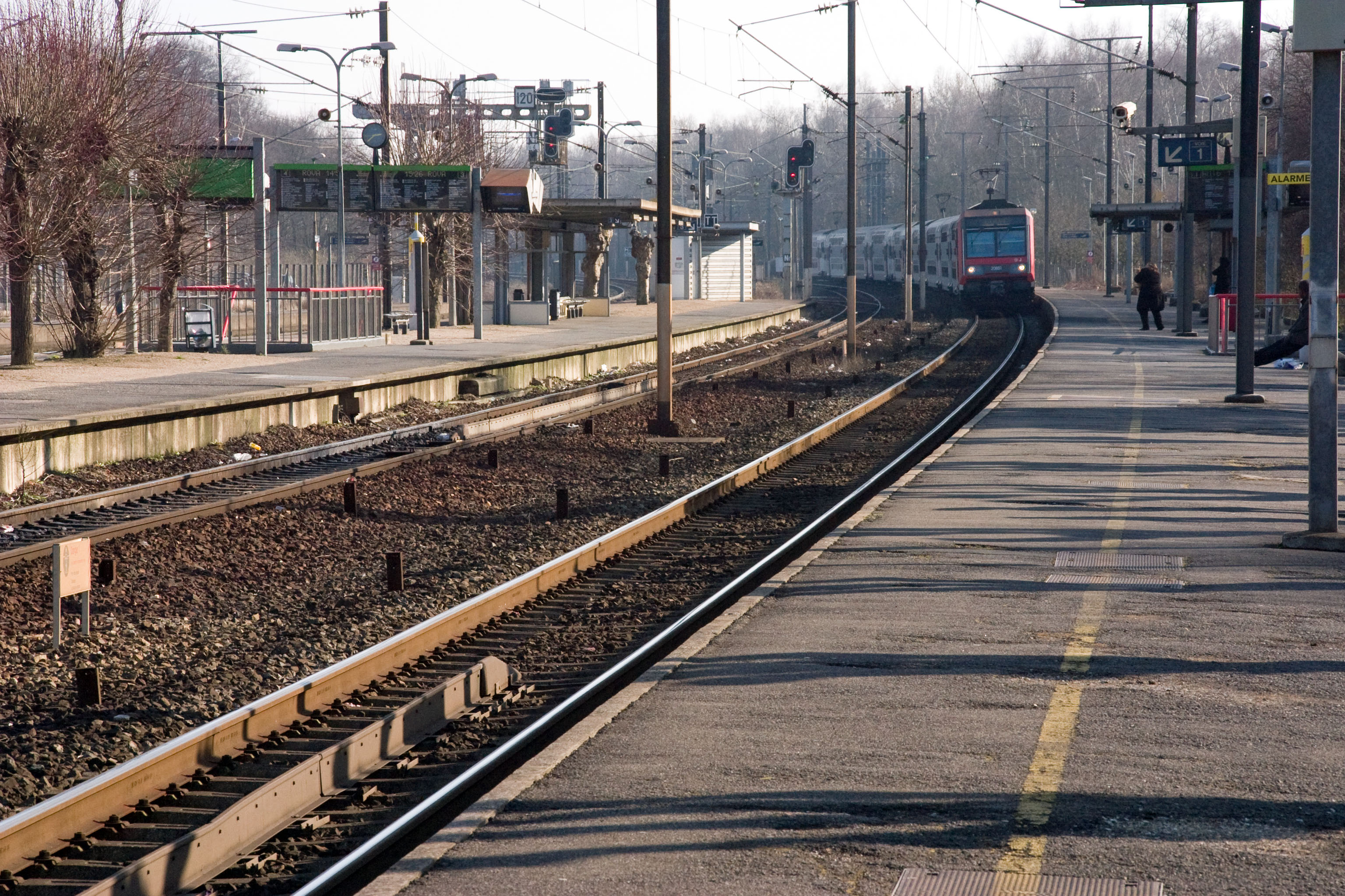 Gare d'Orry-la-Ville - Coye, Orry-la-Ville, département de l'Oise (France)